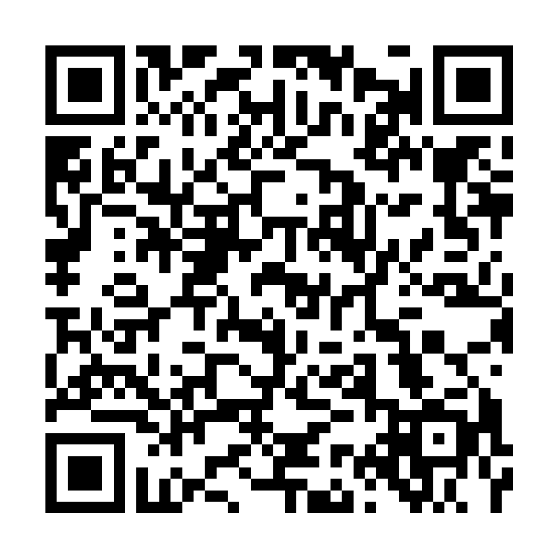 Nifty Telugu QR Code